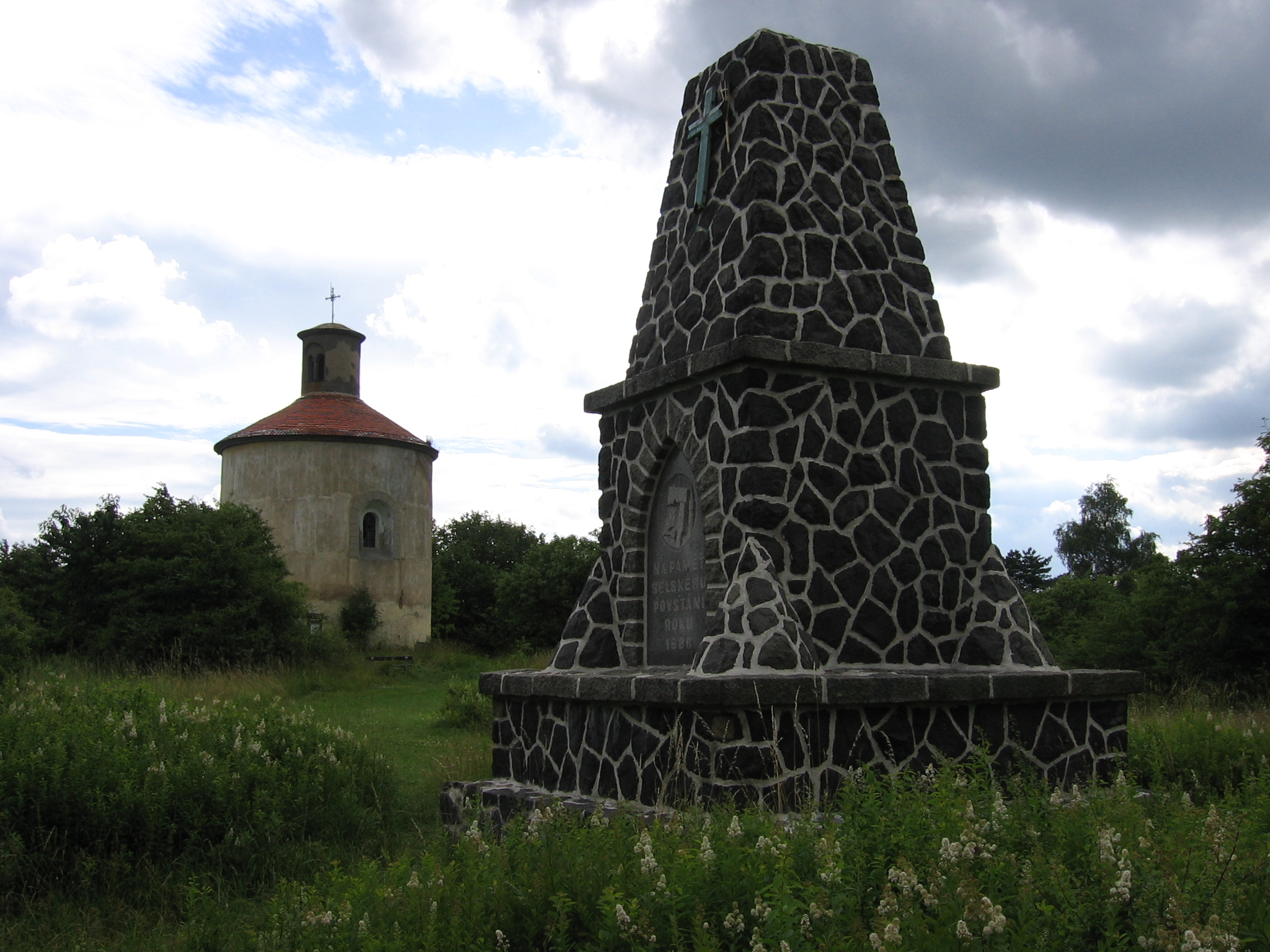 Pomník selské vzpoury - pylon a kaple (Ovčí vrch, Kokašice), okr.Tachov